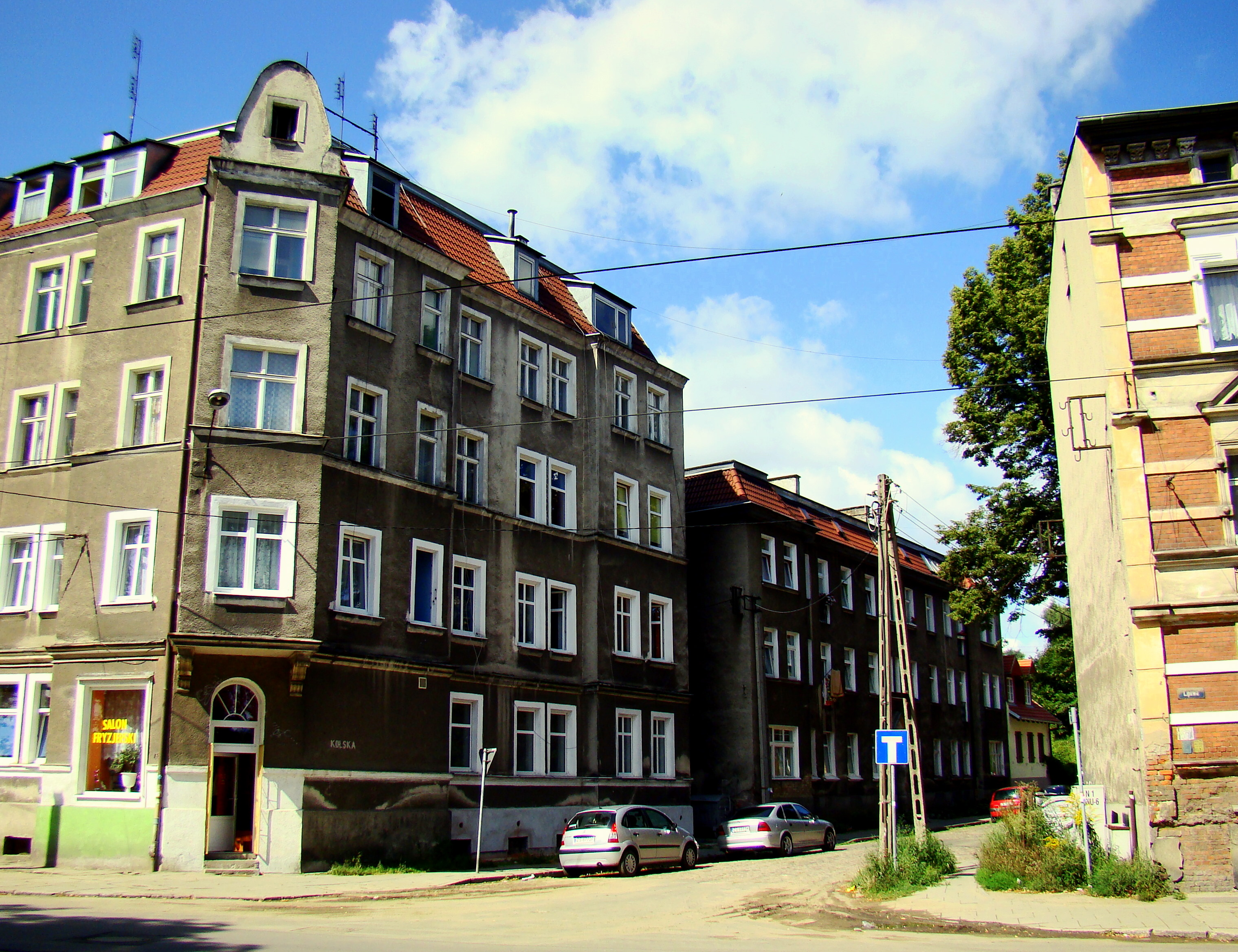 Szczecin-Gocław, Polska